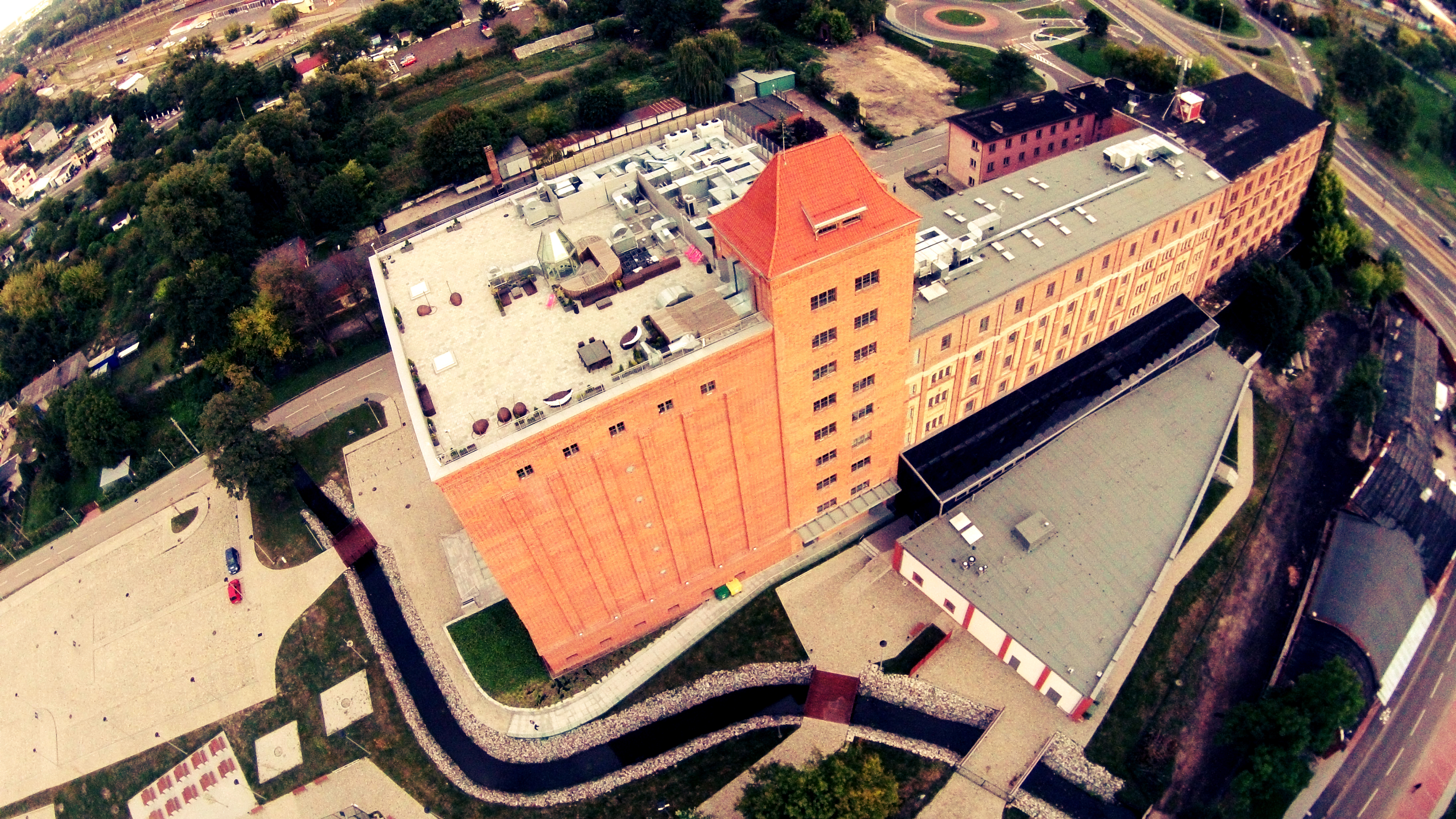 Budynek Młynów Richtera z lotu ptaka